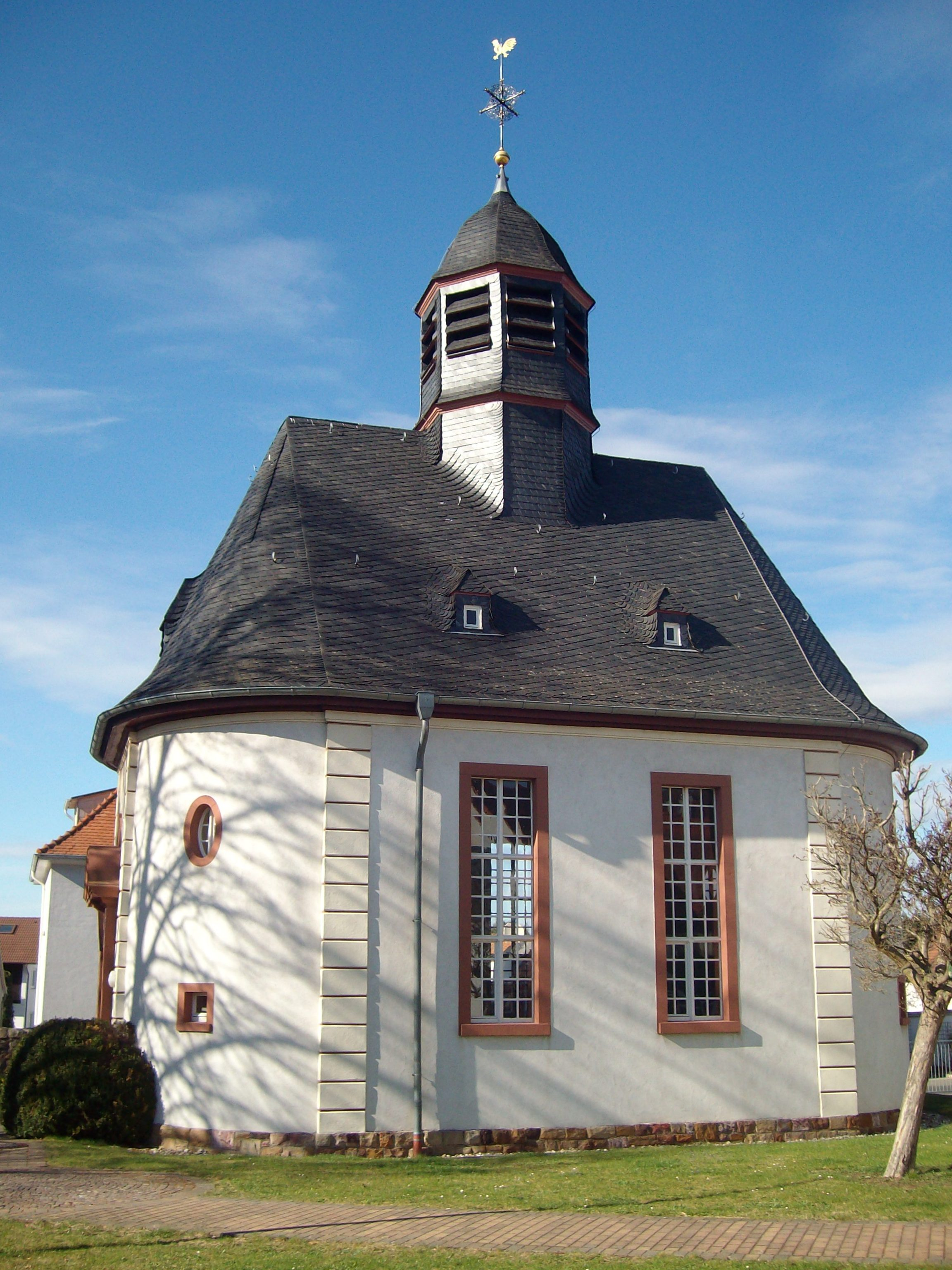 Evangelische Kirche in Ober-Mörlen, Hessen